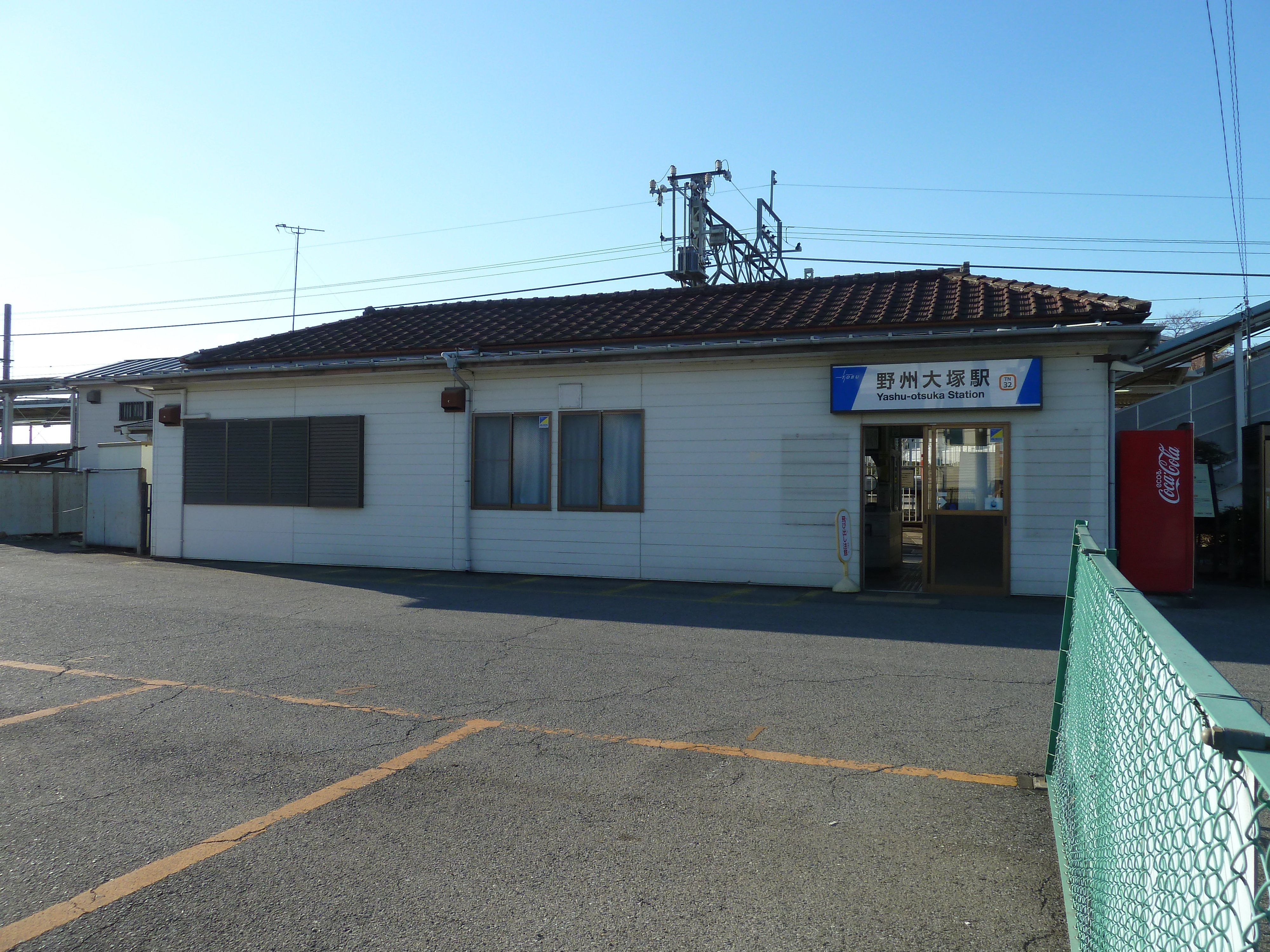 リニューアル後の野州大塚駅